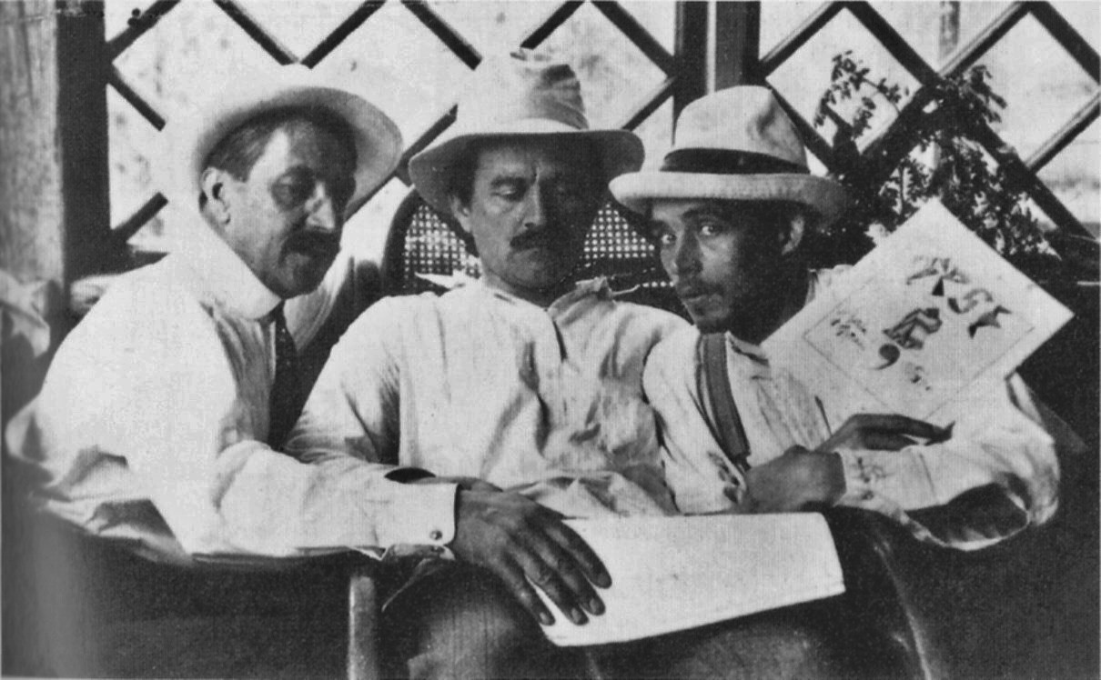 Первый Всероссийский съезд футуристов. Слева направо: Михаил Матюшин, Казимир Малевич, Алексей Крученых на даче у Матюшина в Уусикиркко 18 июля 1913 г. Автор фотографии М. Матюшин.